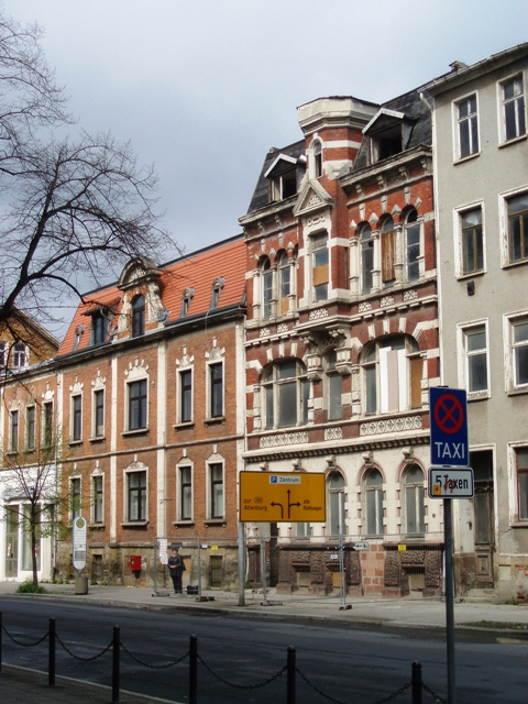 Gründerzeithäuser in der Zeitzer Schützenstraße (mittlerweile abgerissen